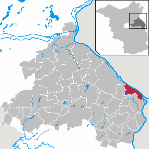 Bleyen-Genschmar in Brandenburg (Country) - District Märkisch-Oderland